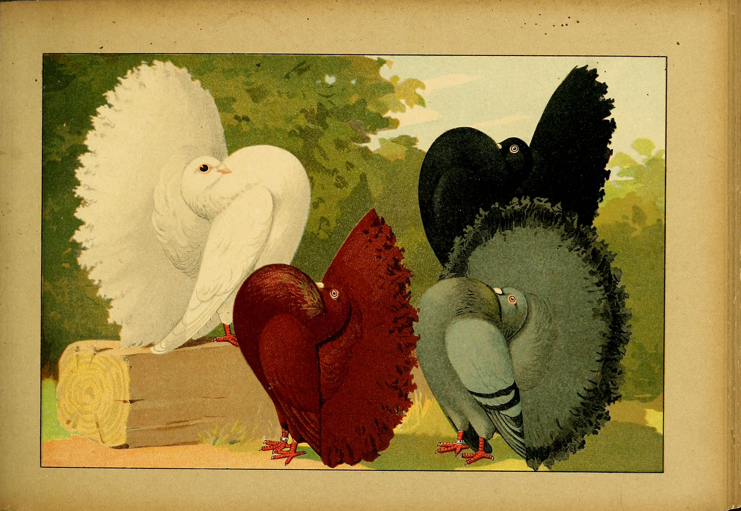 Deutsch